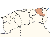 Localisation du département de Constantine, 1962.